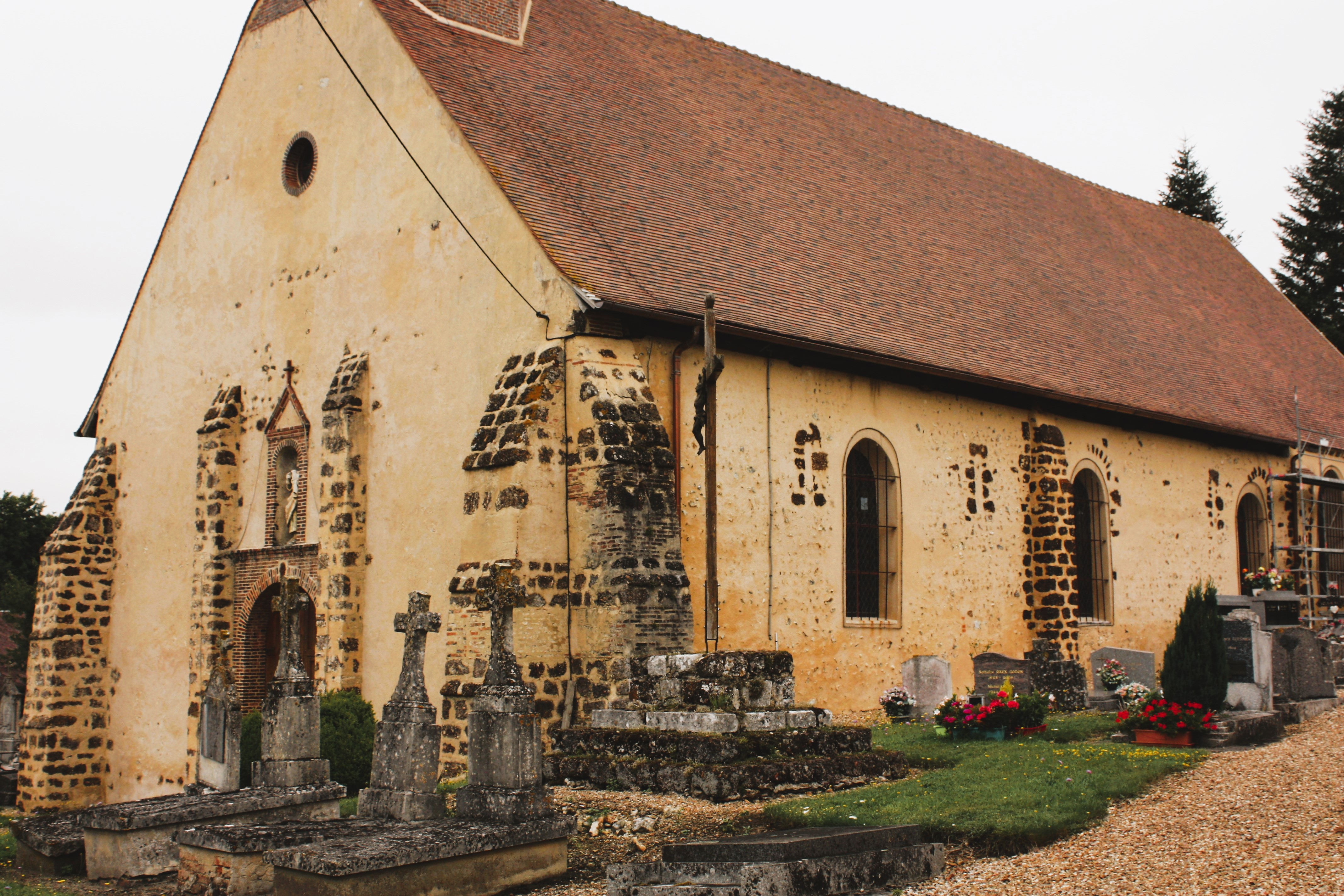 La Puisaye - Eglise Saint-Jean-Baptiste Vue du Sud-Ouest